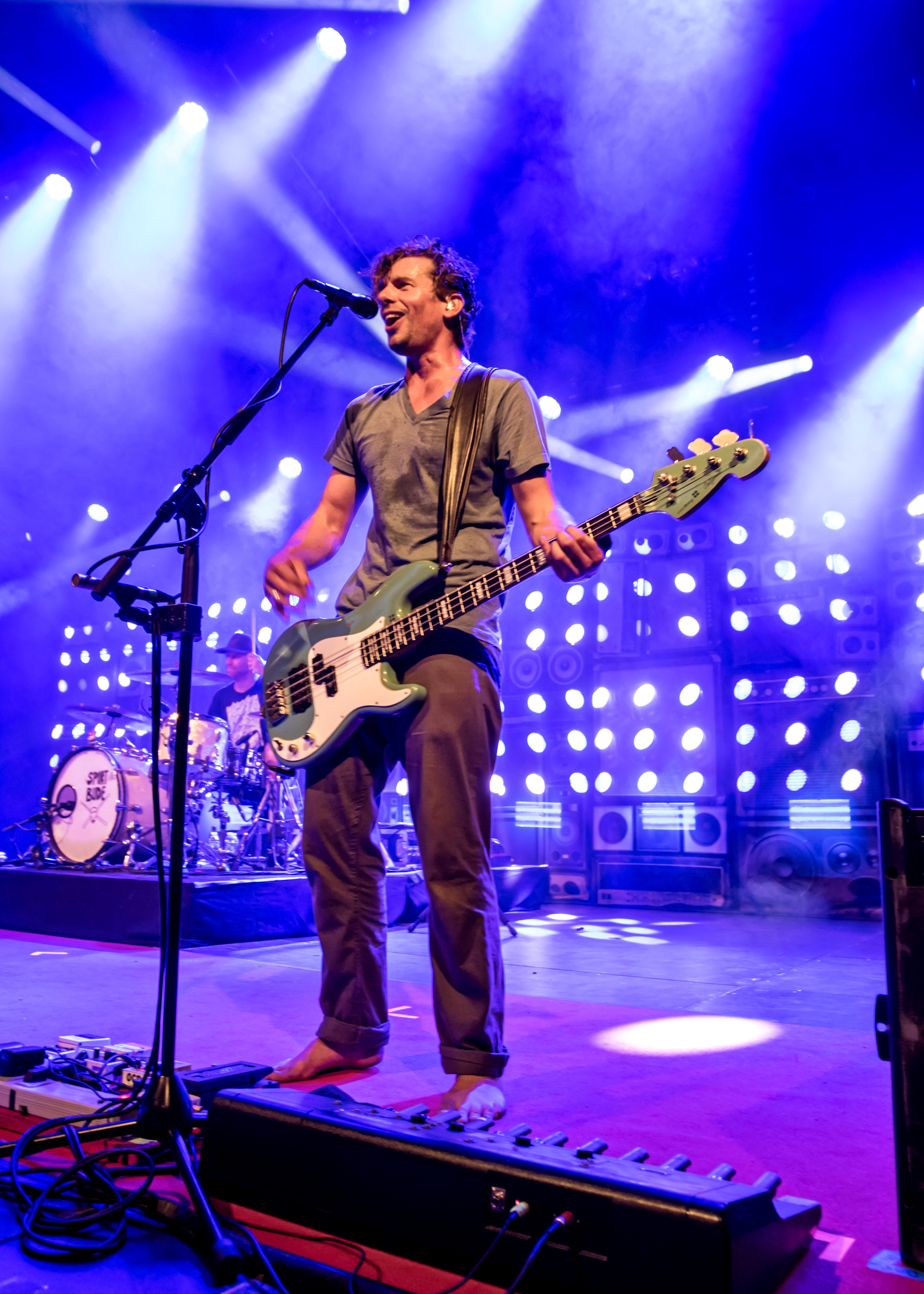 Bilder vom Zelt Musik Festival 2017 in Freiburg im Breisgau Sportfreunde Stiller am 18.07.2017